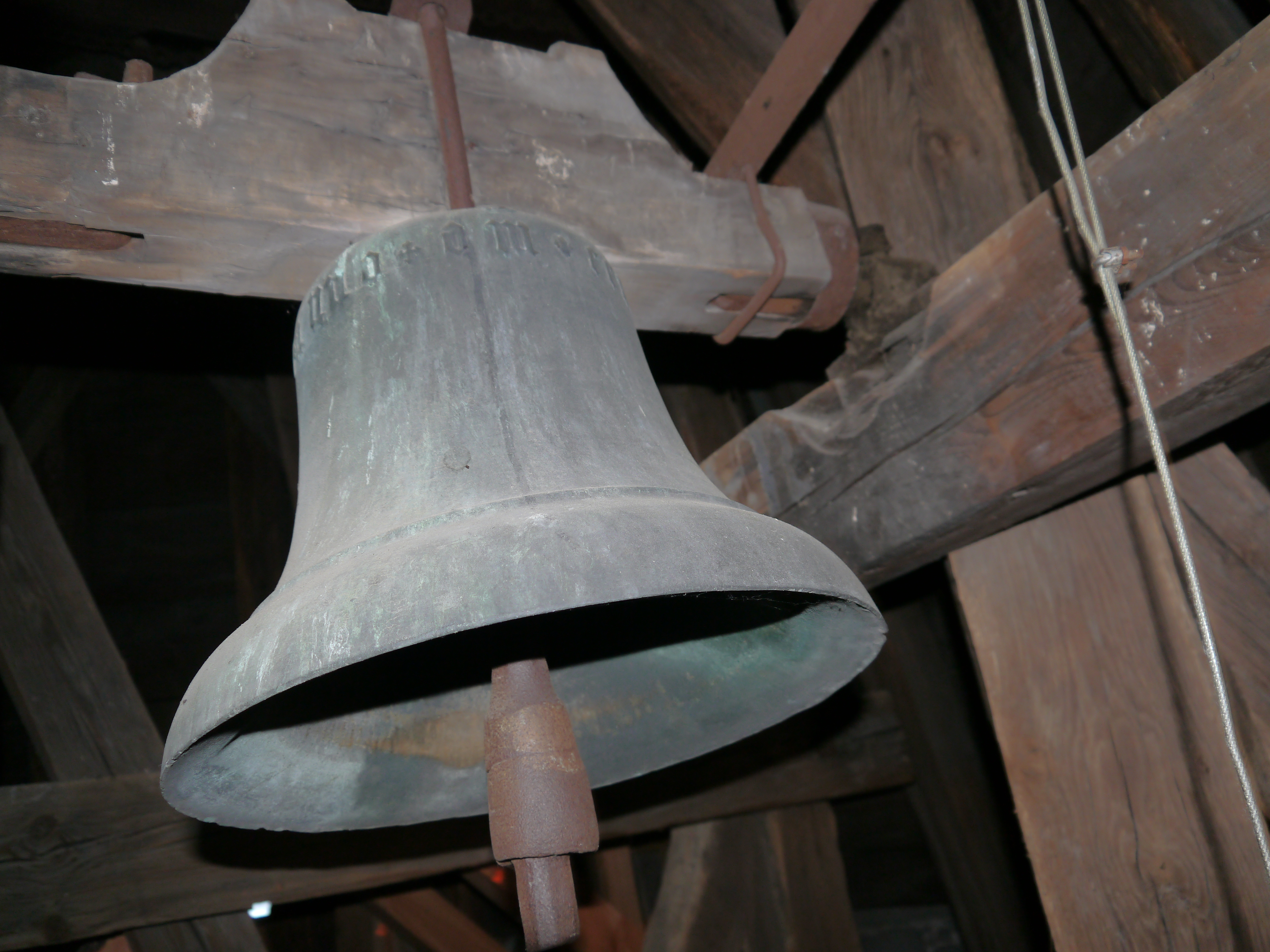 St. Gallus Ladenburg (Südturm) – Schutzengelglocke (1439) Ø 425 mm, 80 kg, es